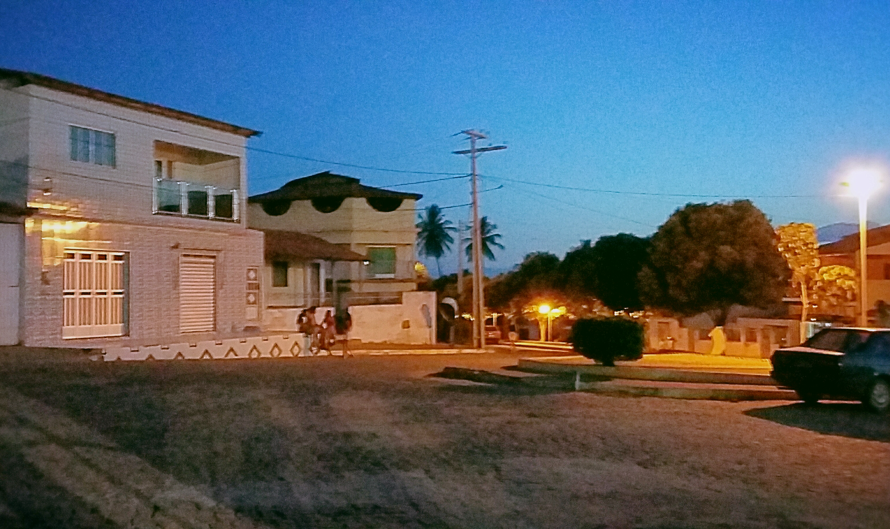 Vista da Daniel Teixeira